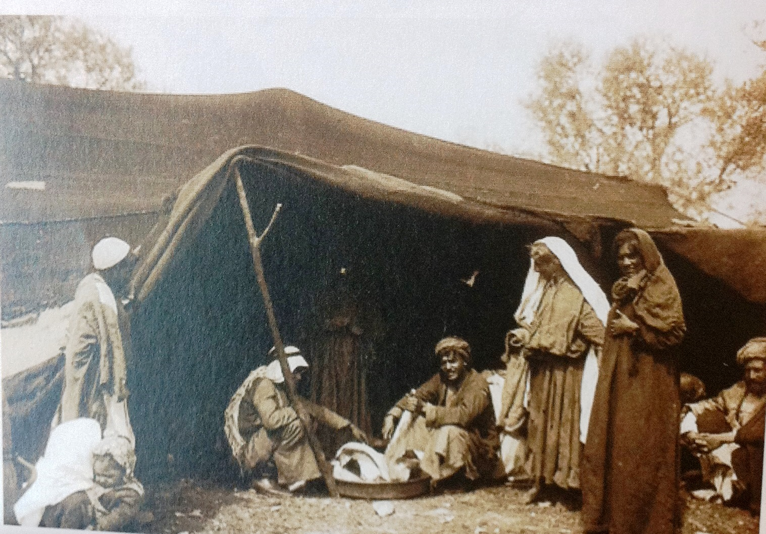 אוהל אופייני של הצוענים, ליד שער שכם